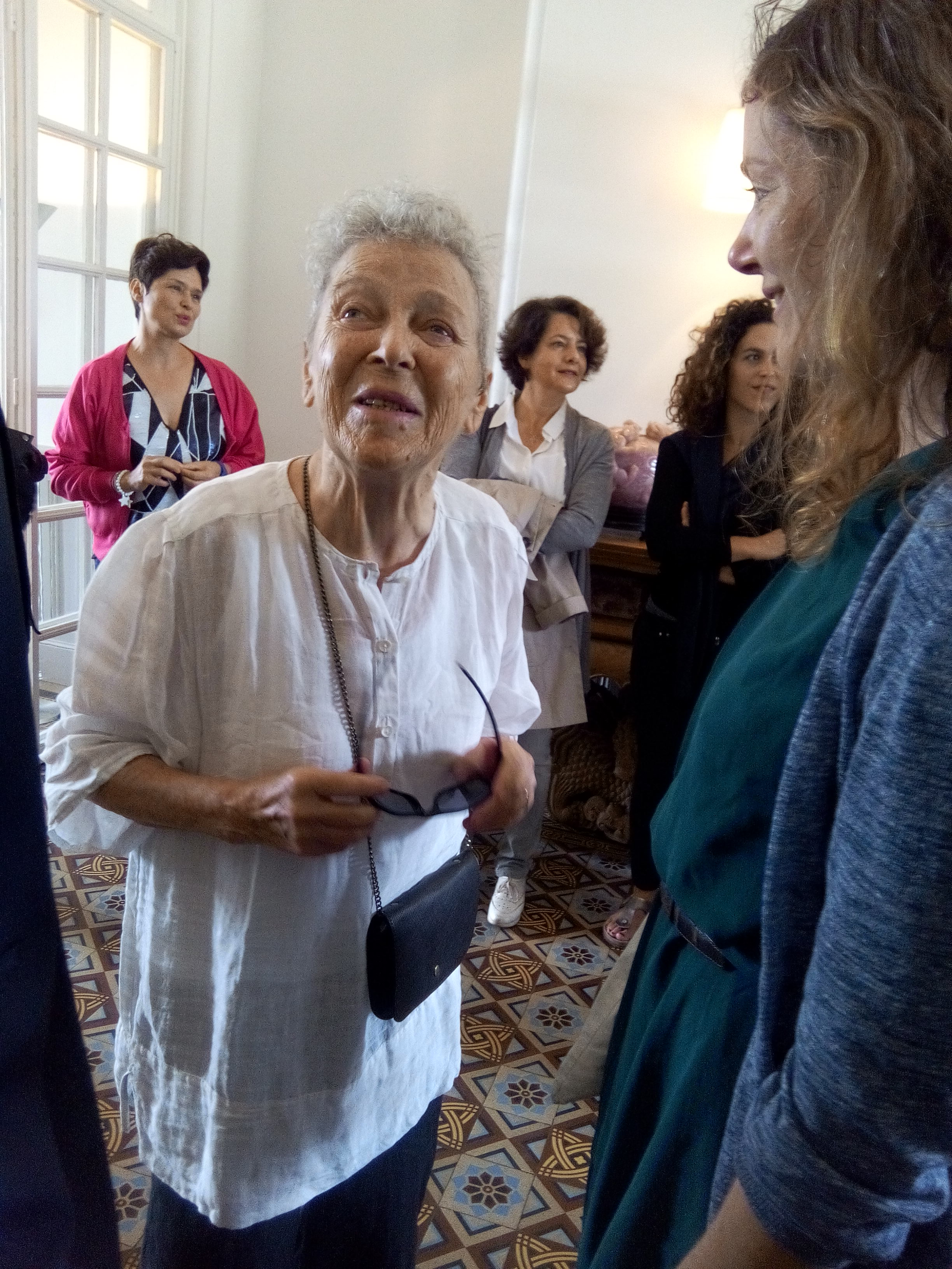 Portrait de Marion Baruch, 2016